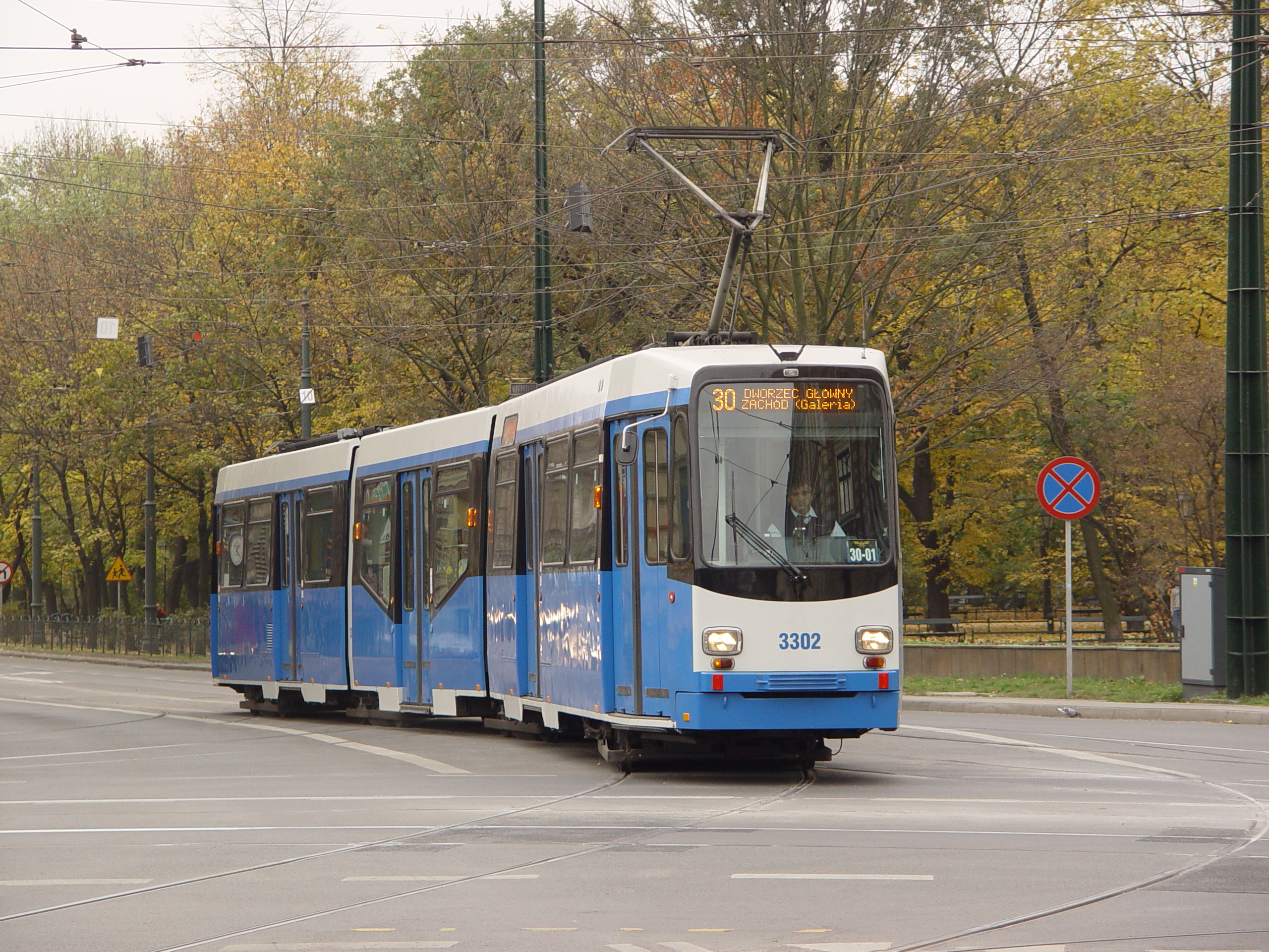 N8S-NF